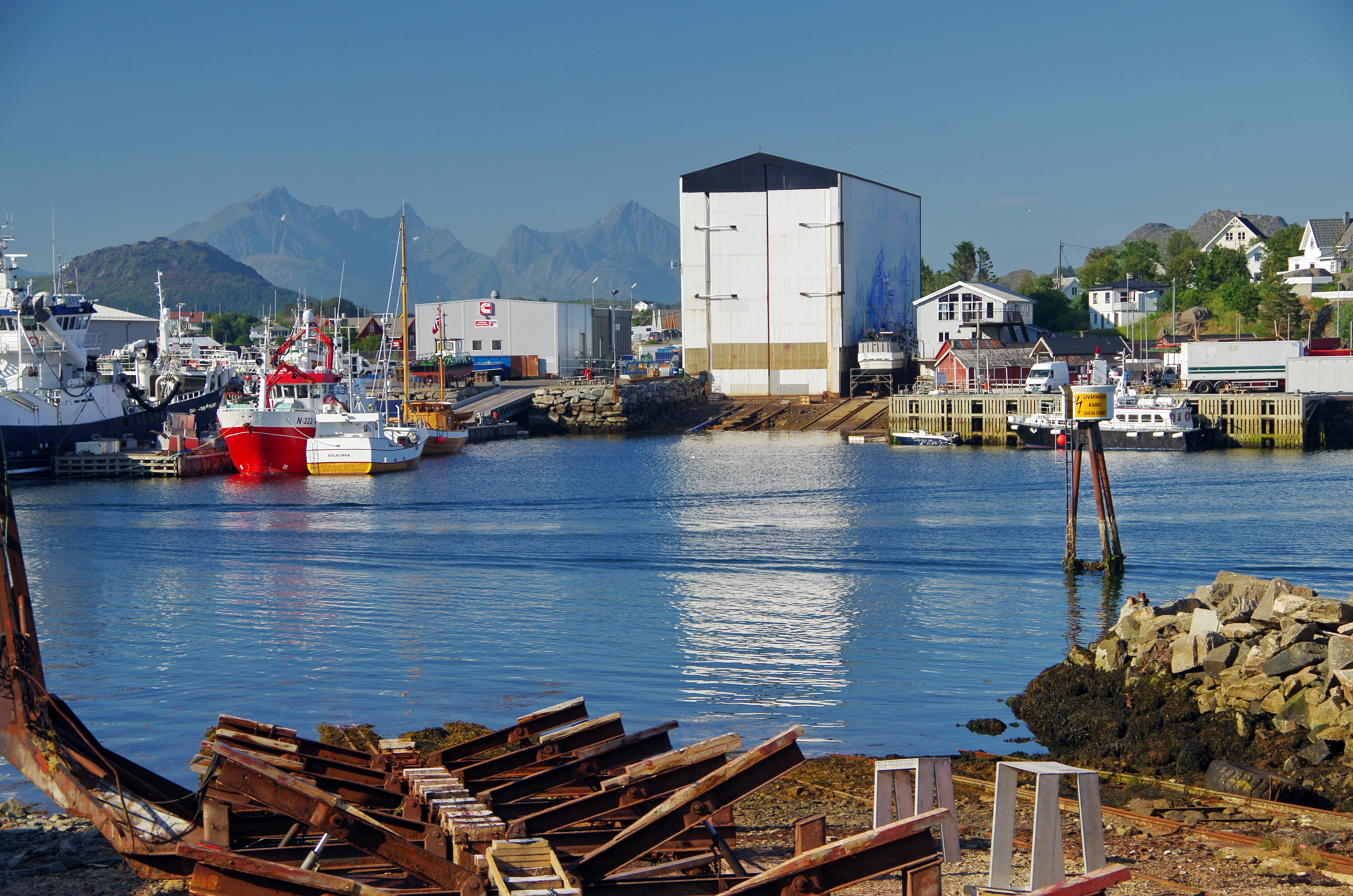 Hafen Ballstad